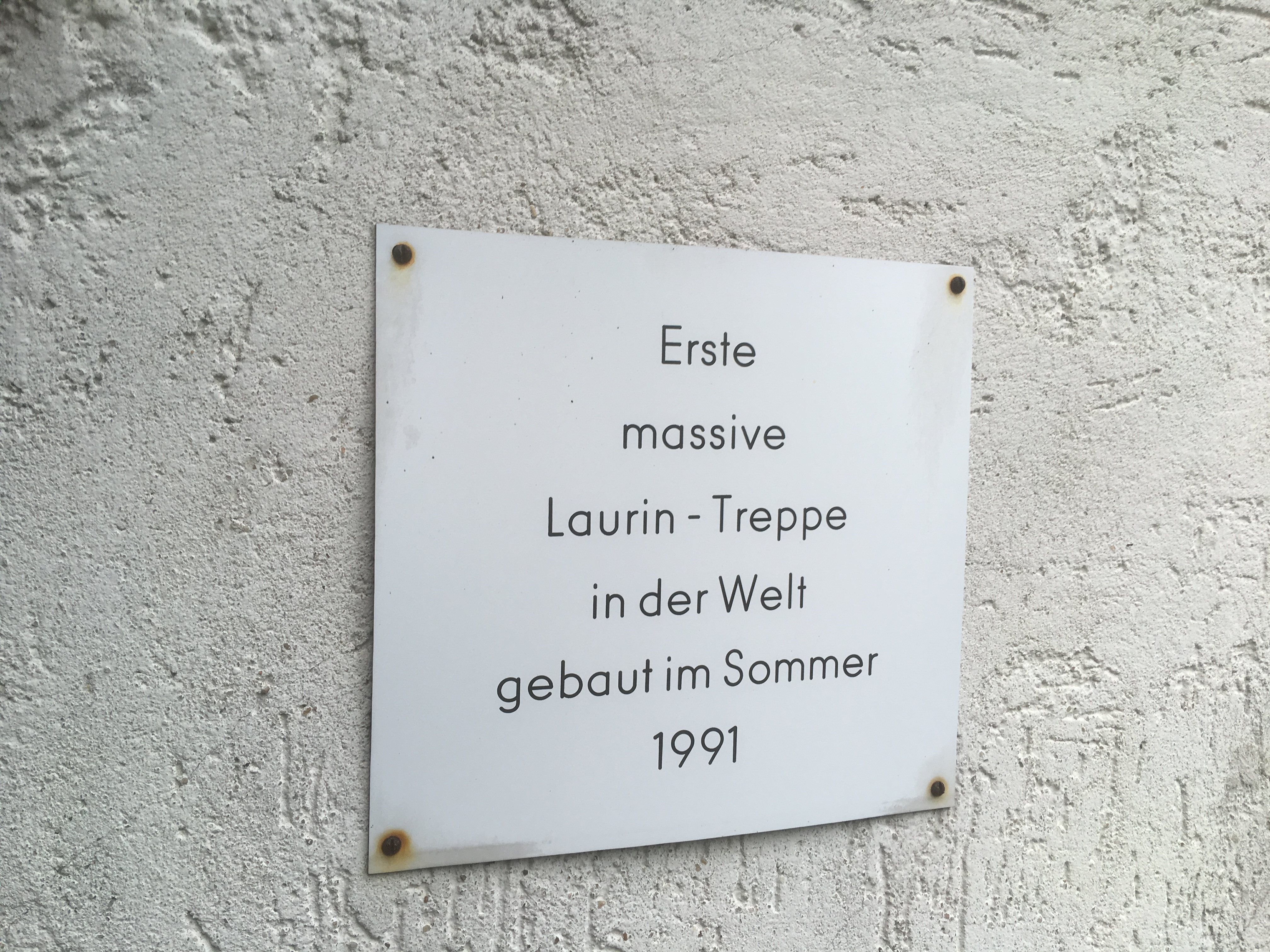 Hinweistafel auf die Laurin-Treppe in Konstein